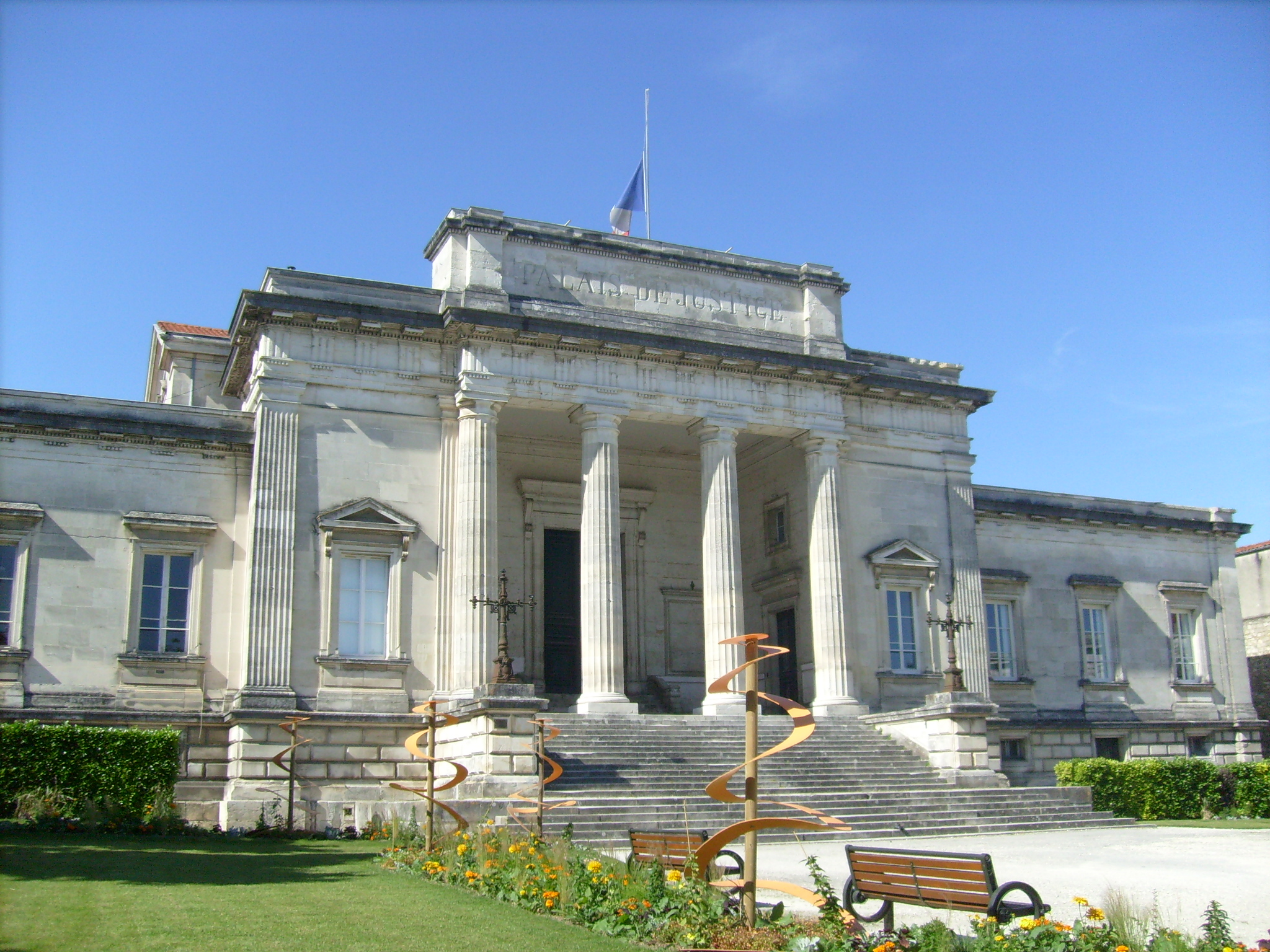 Le palais de justice de Saintes